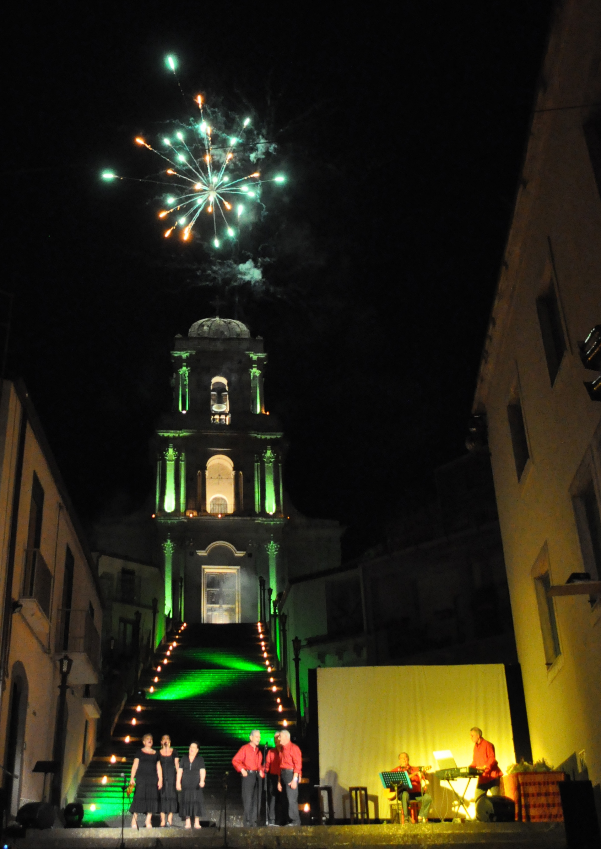 Manifestazione popolare a Buccheri